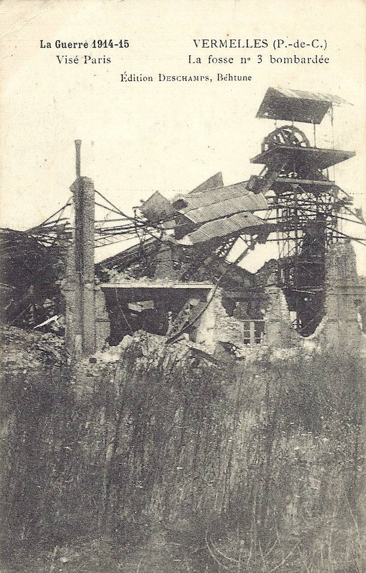 La fosse n° 3 de la Compagnie des mines de Béthune était un charbonnage constitué d'un seul puits situé à Vermelles, Pas-de-Calais, Nord-Pas-de-Calais, France.